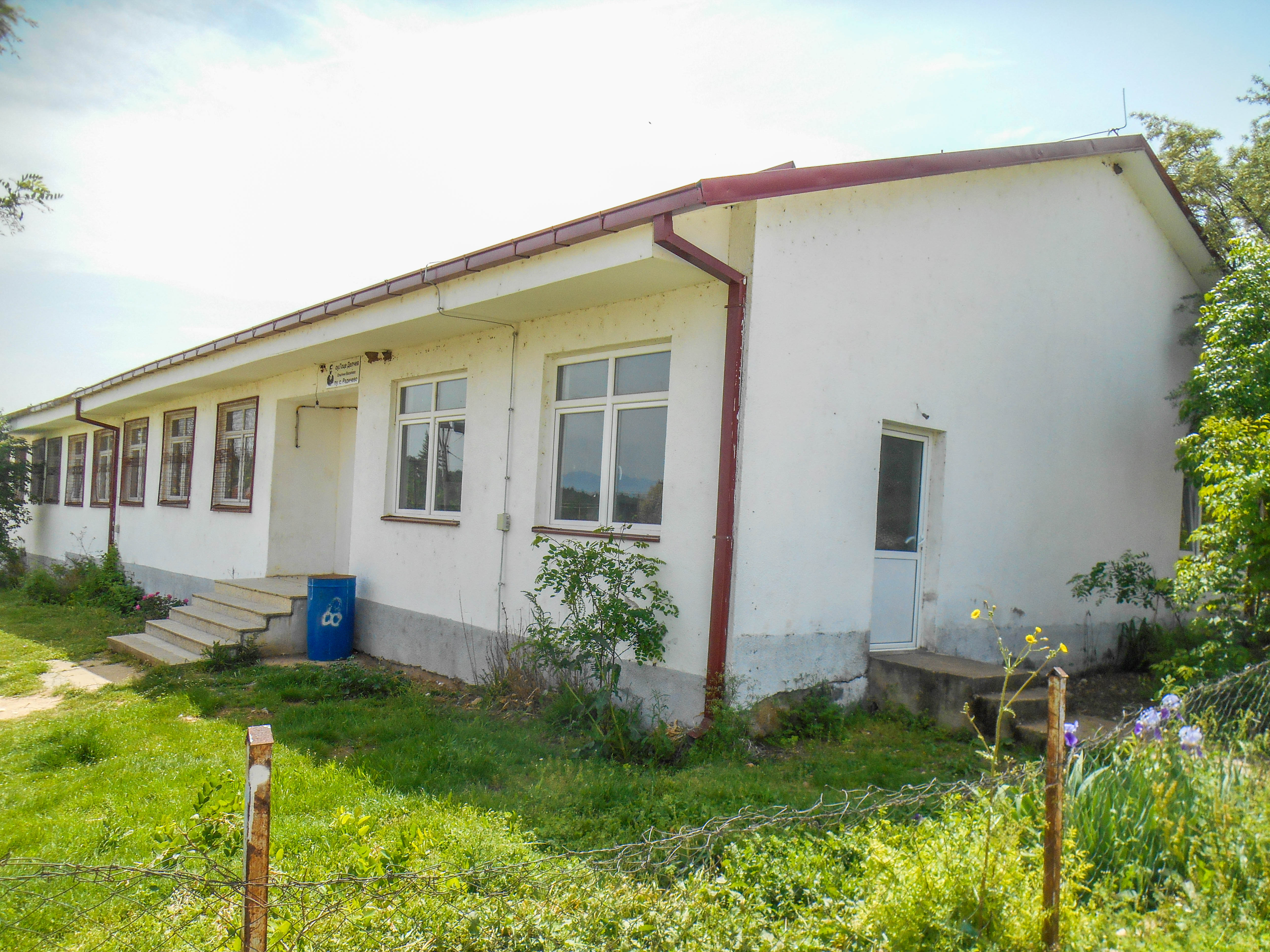 Основно училиште „Гоце Делчев“ - Радичево